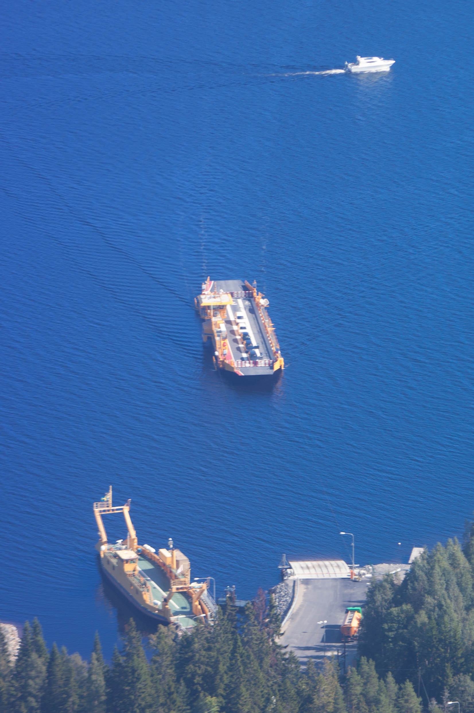 Hemsöleden, Strinningens färjeläge, Härnösands kommun.